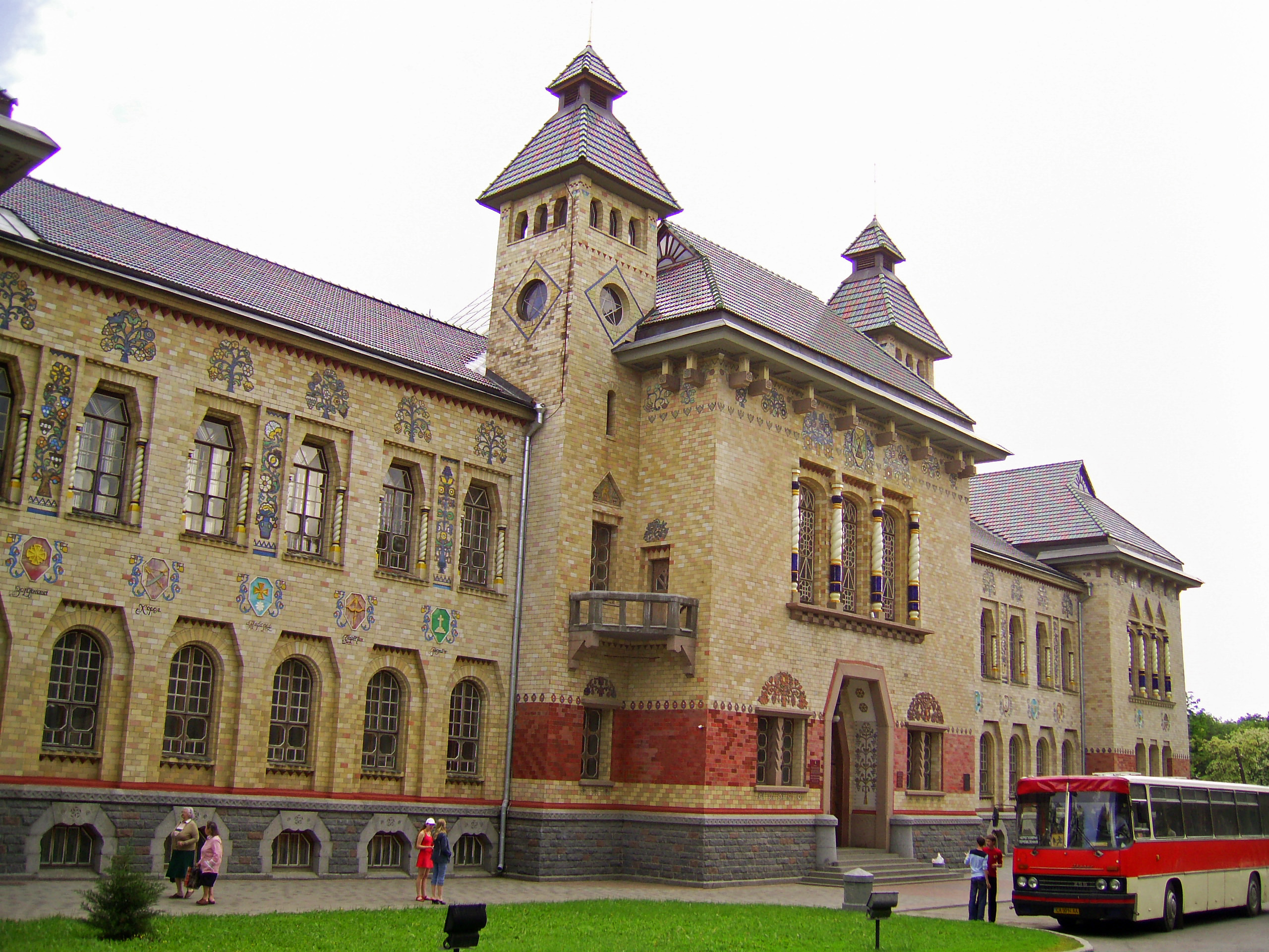 Будинок губернського земства: Полтава, пл. Леніна, 2